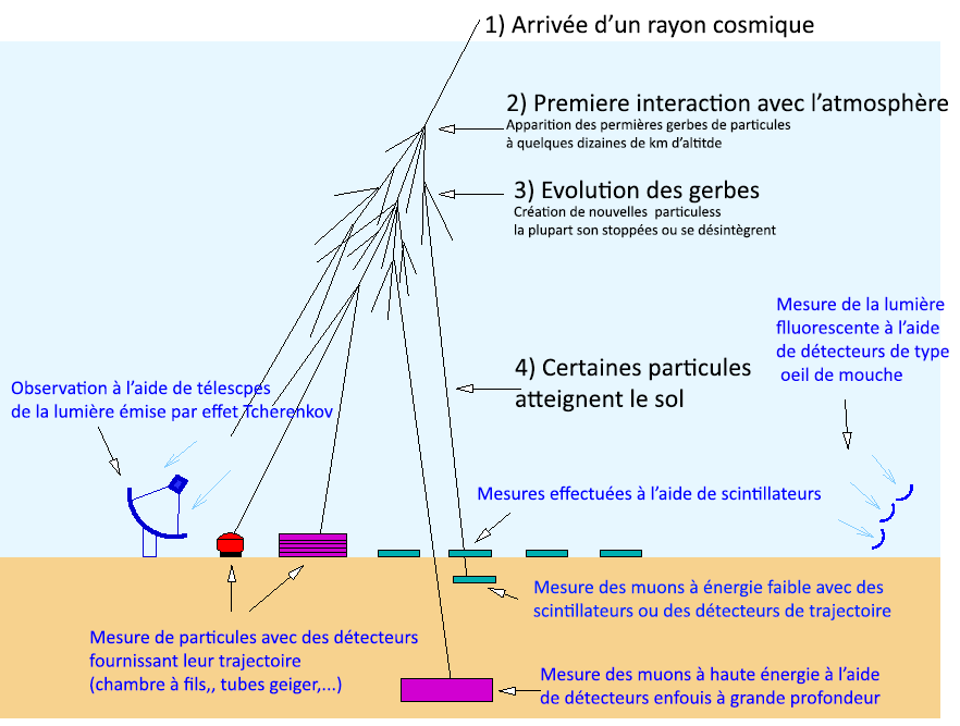 Les différents types de détecteur utilisés pour étudier les rayons cosmiques à haute énergie et les rayons gamma. Version avec légende en francais